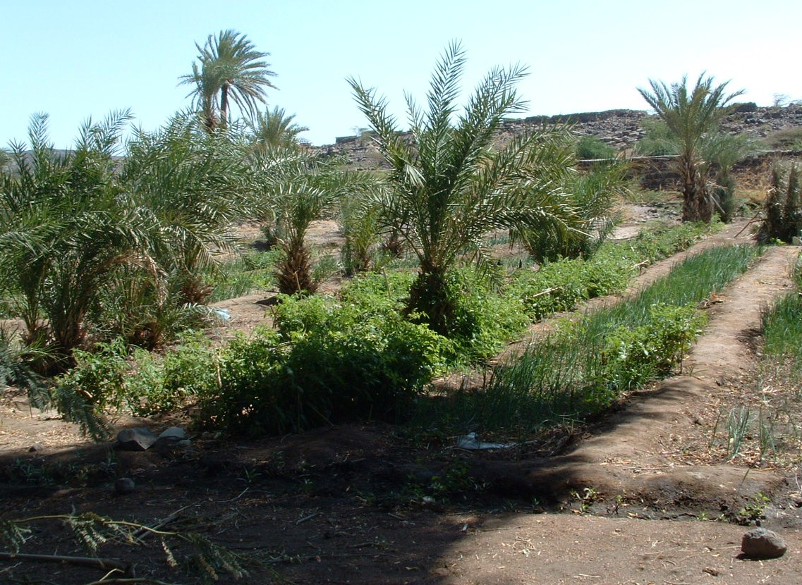 Palmeraie, à Dikhil, Région de Dikhil, République de Djibouti.